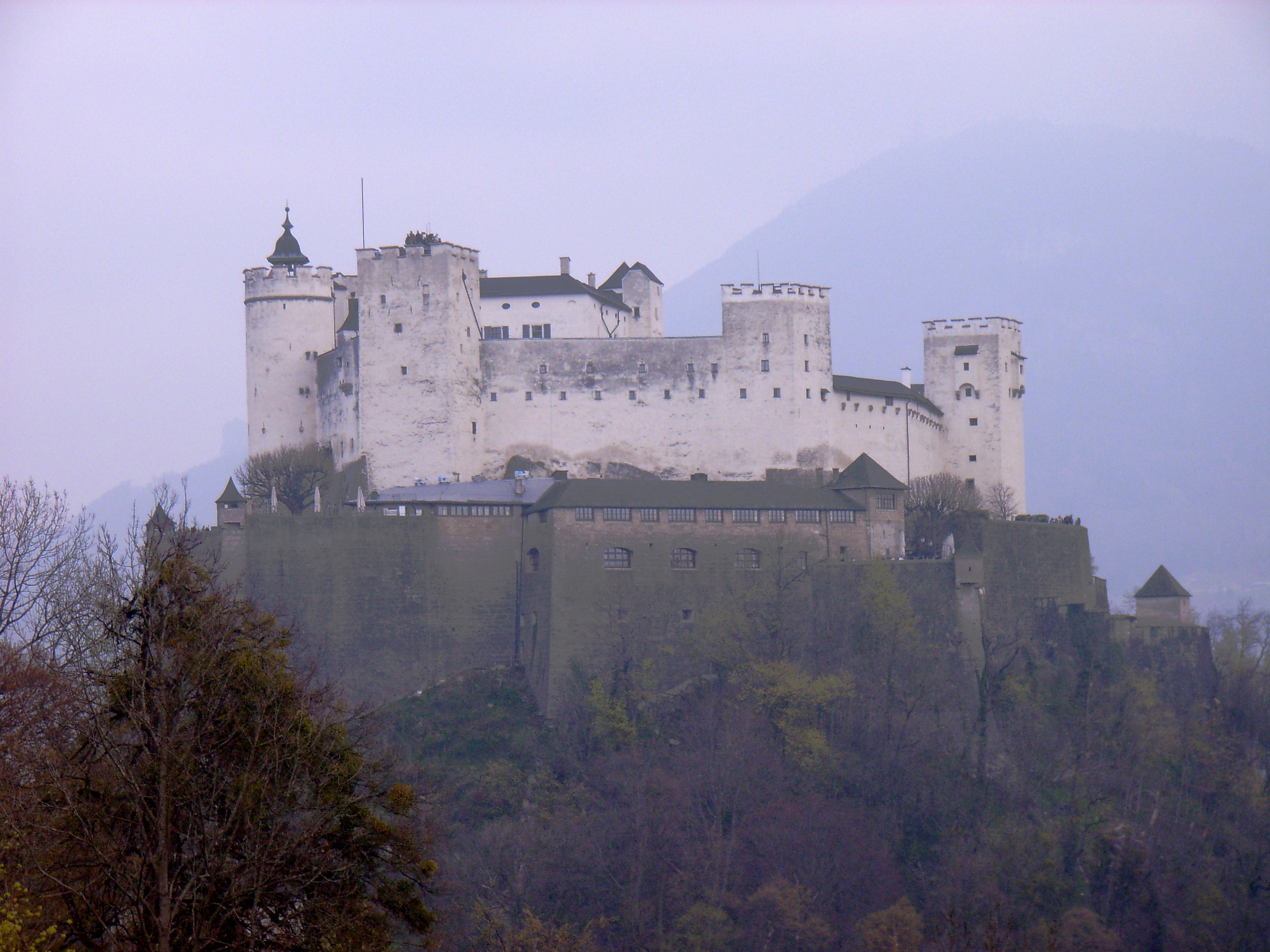 Festung Hohensalzburg von Westen (Mönchsberg) gesehen